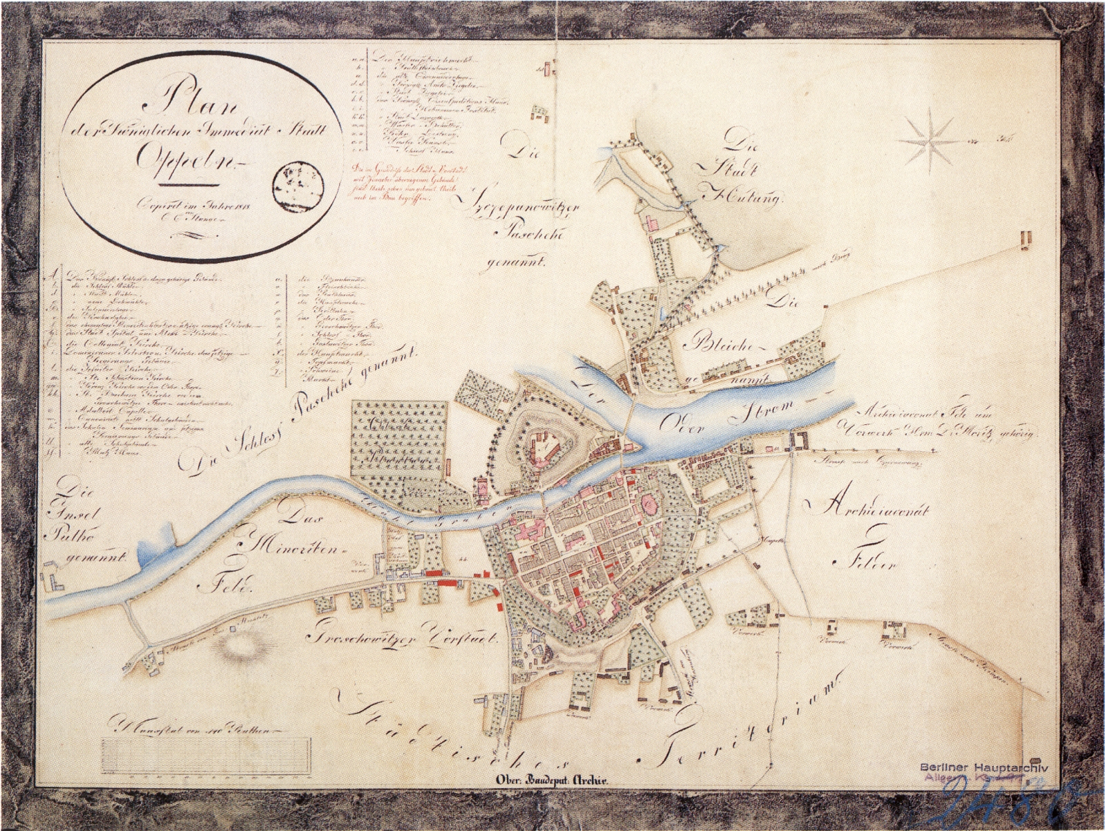 Map of Oppeln/Opole in 1818.